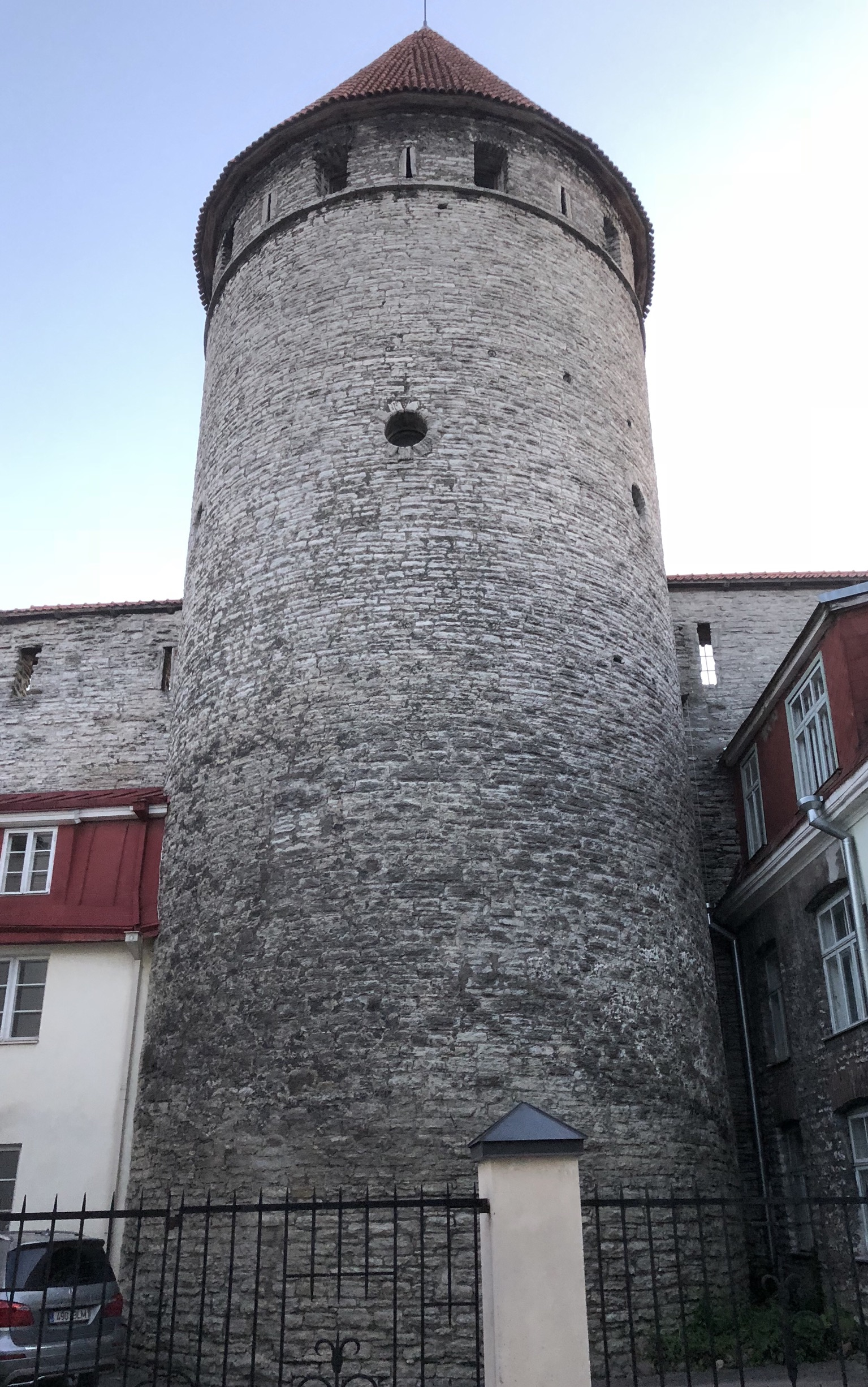 Hellman-Turm der Revaler Stadtbefestigung